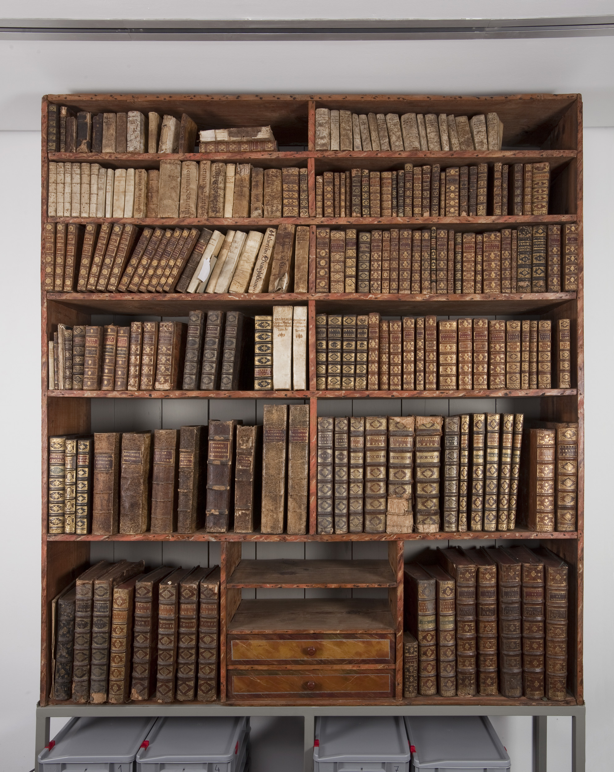 Un dels mobles de la Biblioteca Salvador